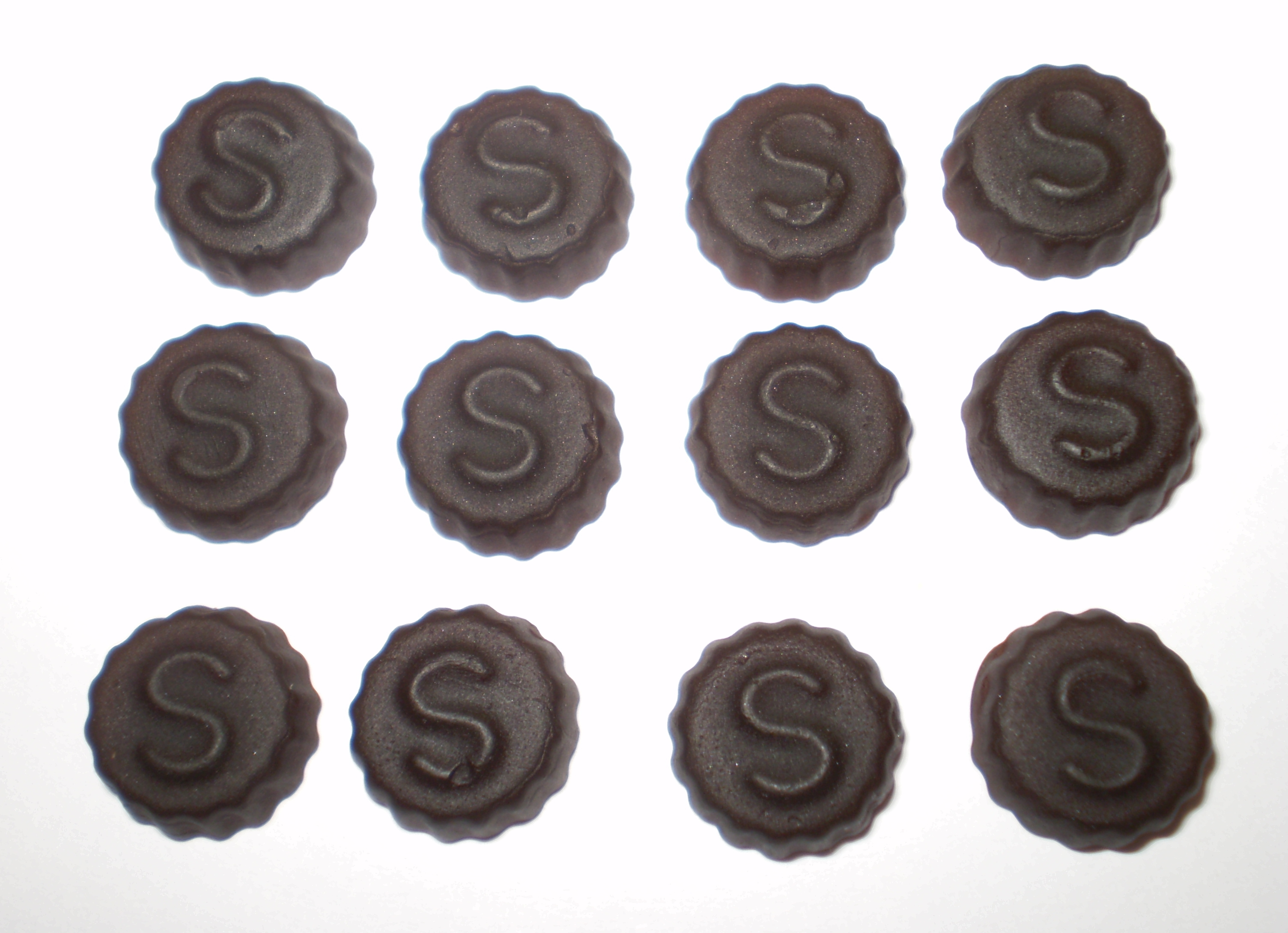 Leafin valmistamia Sisu Xylitol -pastilleja